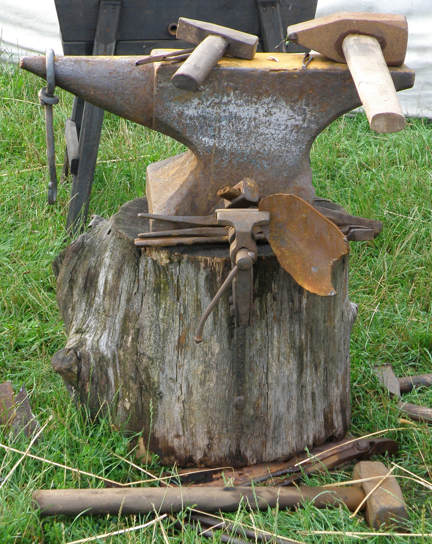 Warszawa, Park Skaryszewski, bitwa polsko-szwedzka o Warszawę z 1656 - obozowisko